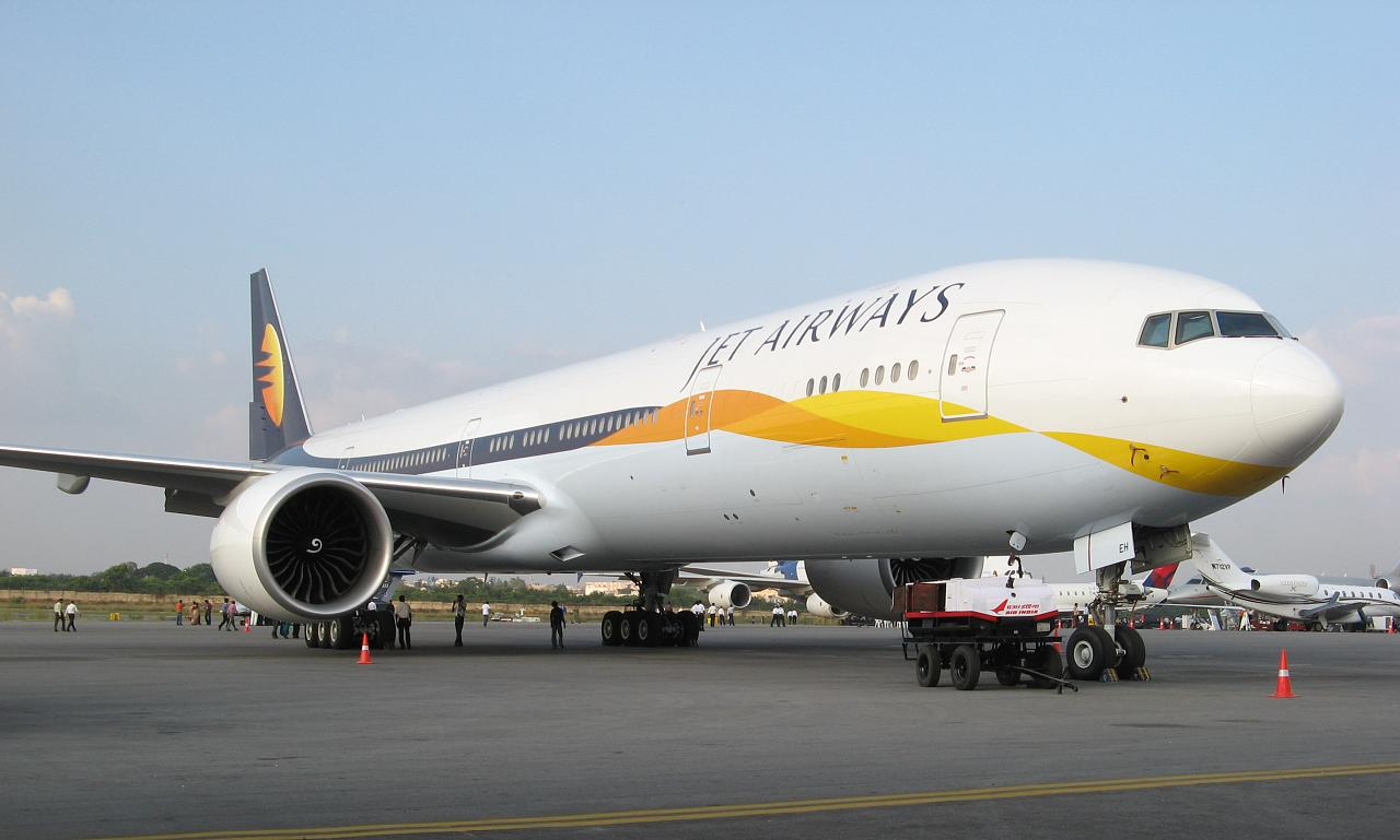 தற்போதைய ஜெட் ஏர்வேஸ் பணியாளர் உடை-"பறக்கும் சூரியன்".